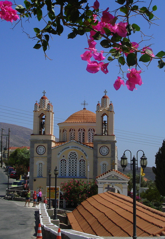 Rodos, Siana